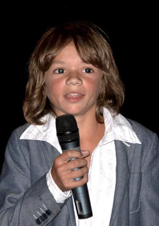 Max Baissette de Malglaive à l'avant-première du film "Une place sur la terre"